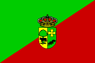 Bandera de Prádena del Rincón, en Madrid (España)